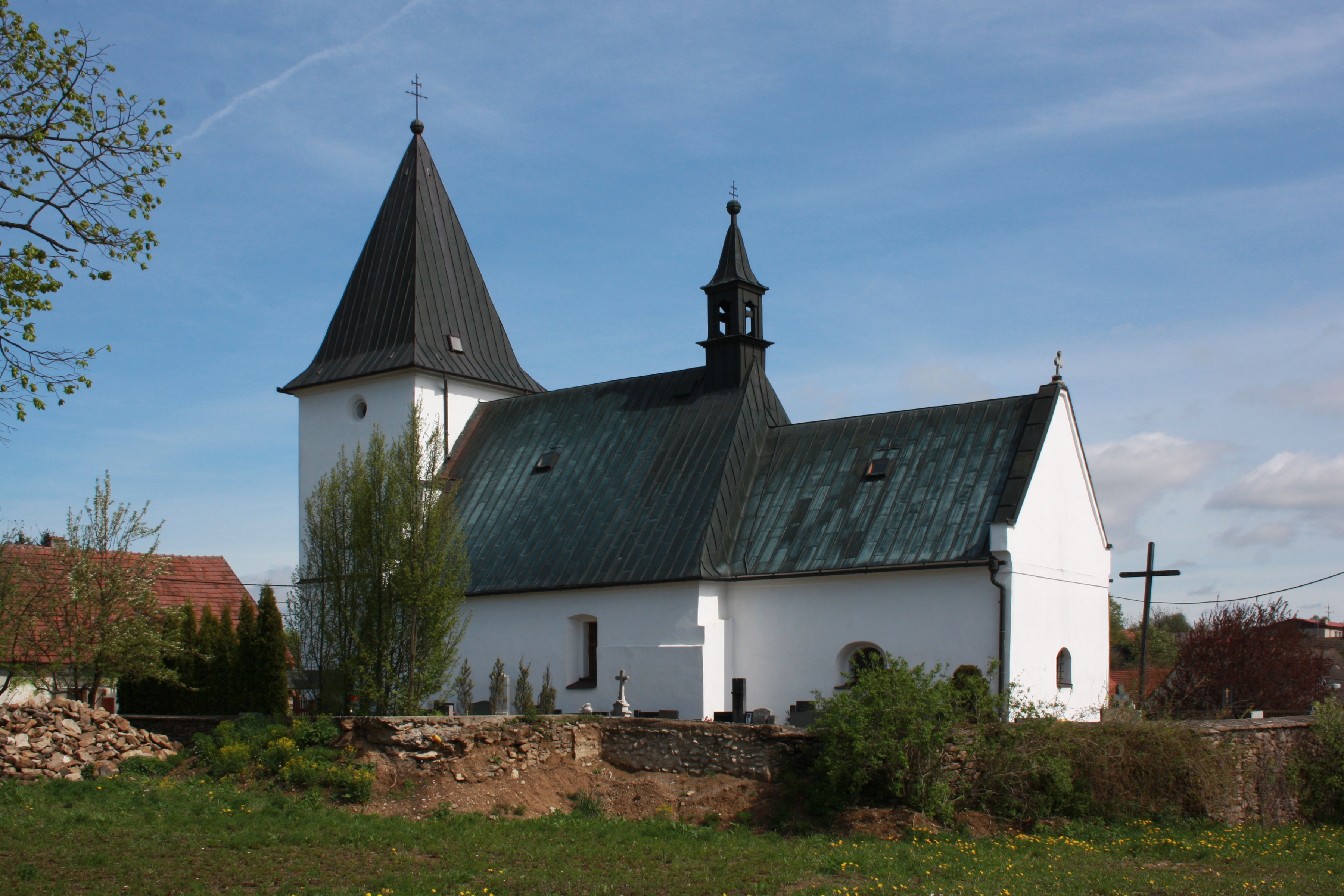 Bukov - kostel svatého Jakuba Většího, původně raně gotický z 13. století, upraven roku 1857 This photograph was taken within the scope of the 'Czech Municipalities Photographs' grant. This photograph was taken with a DSLR from WMCZ's Camera grant.